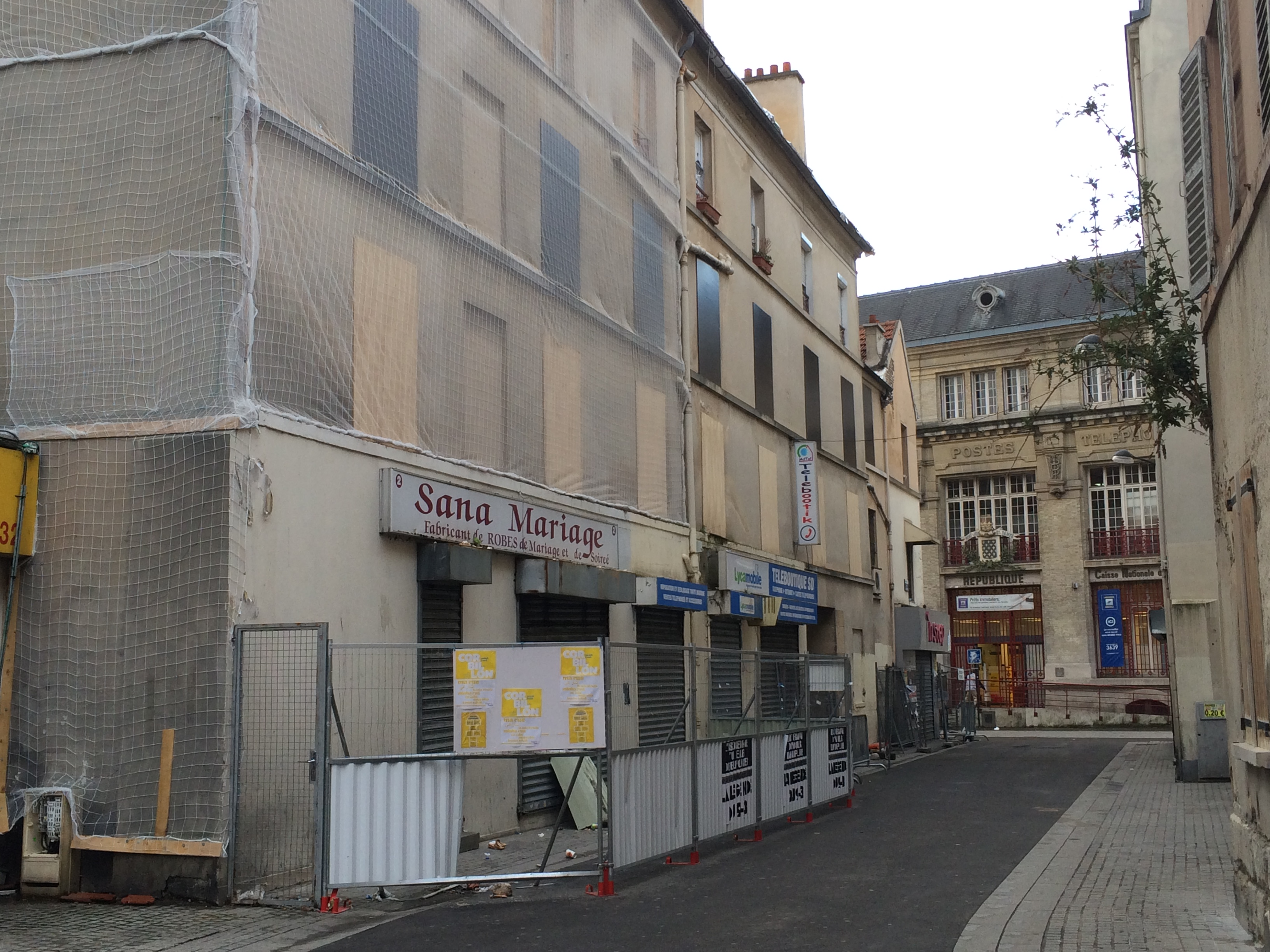 L'immeuble du 48 rue de Corbillon six mois après l'opération policière du 18 novembre 2015. Au second plan, le bureau de poste de la rue de la République.